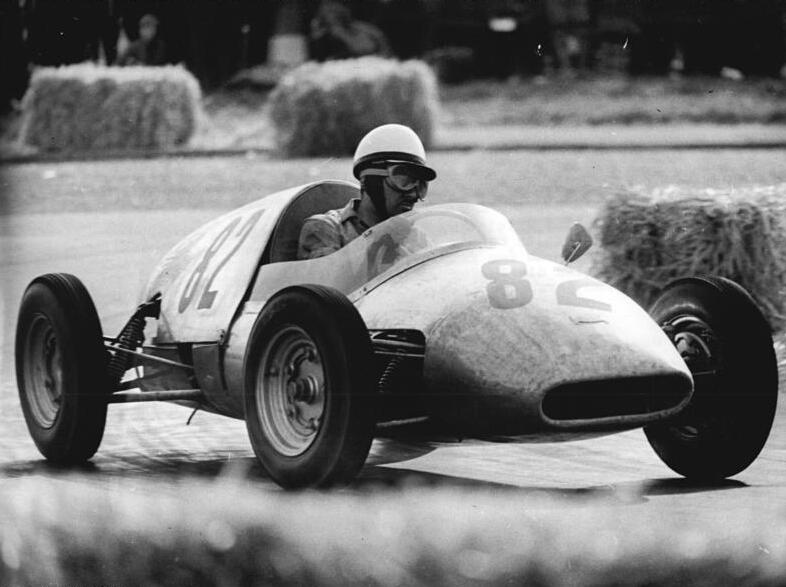 ADN-ZB Kohls 23.4.1961 Auf der Halle-Saale-Schleife dröhnen die Motoren Am 23.4.1961 erfolgt um 10.00 Uhr der Start zum Internationalen Rennen auf der Halle-Saale-Schleife. Bereits in den frühen Morgenstunden des 22.4.61 trainierten die Fahrer und machten sich so mit dem schweren Kurs vertraut. UBz: Siegmar Funk (MC Fest Dresden)